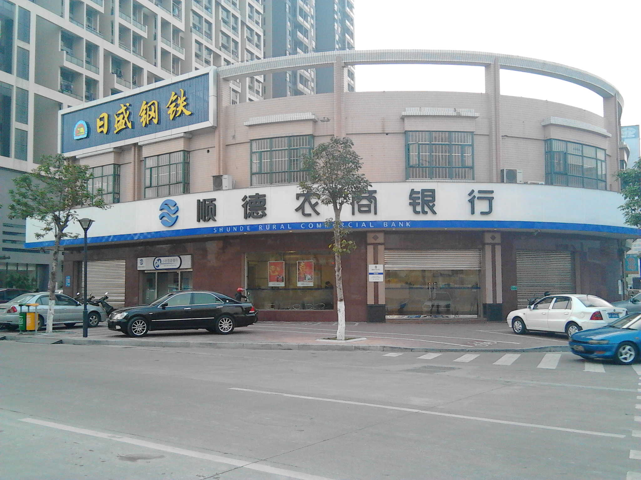 顺德农商银行支行照片，位于顺德乐从镇金宇名都旁。当时是下午五点左右，银行即将关门。